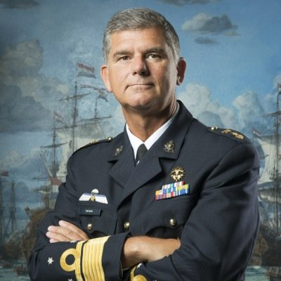 Rob Verkerk C-ZSK